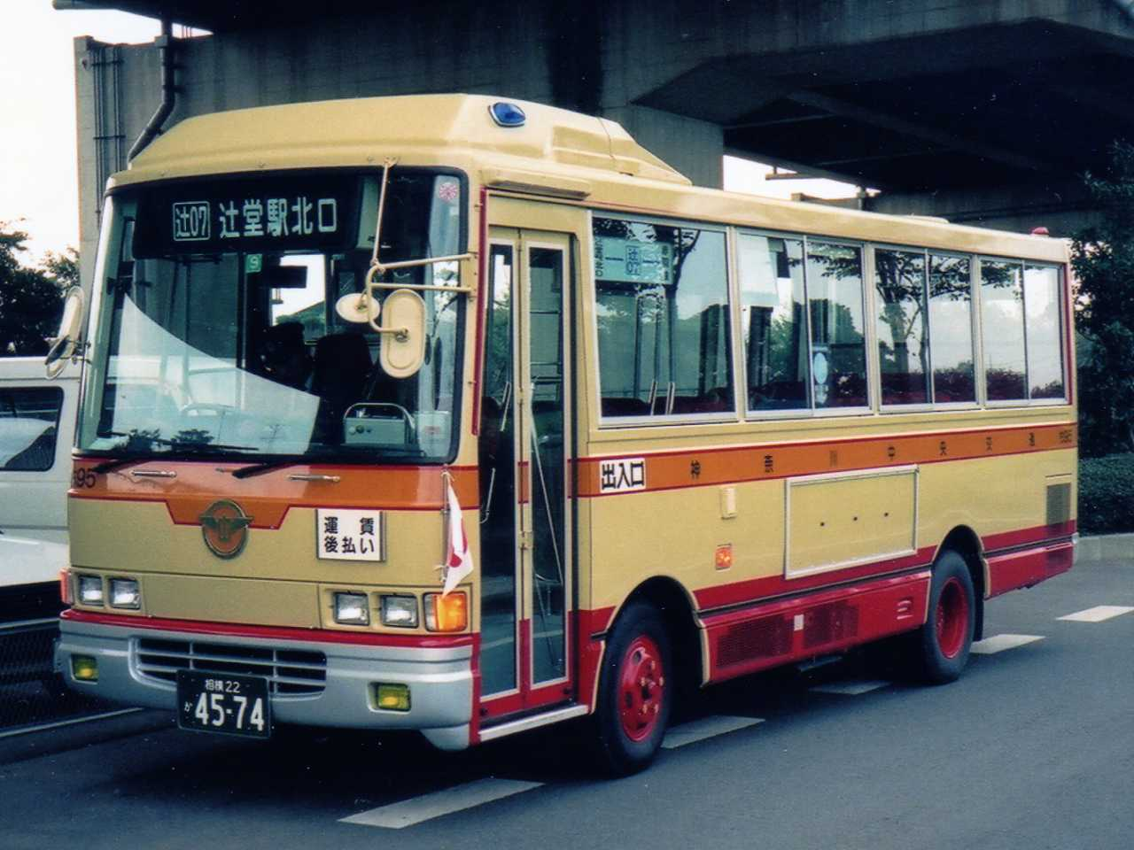 Kanachu Chi95（ち95） Hino U-RB1WEAA at Akabane Busstop